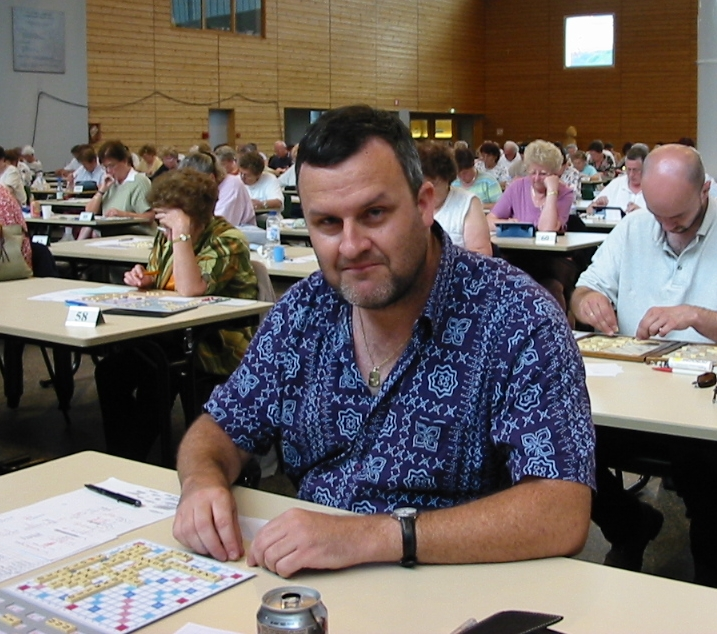 Thierry Chincholle au Festival de Scrabble de La Bresse en juillet 2004